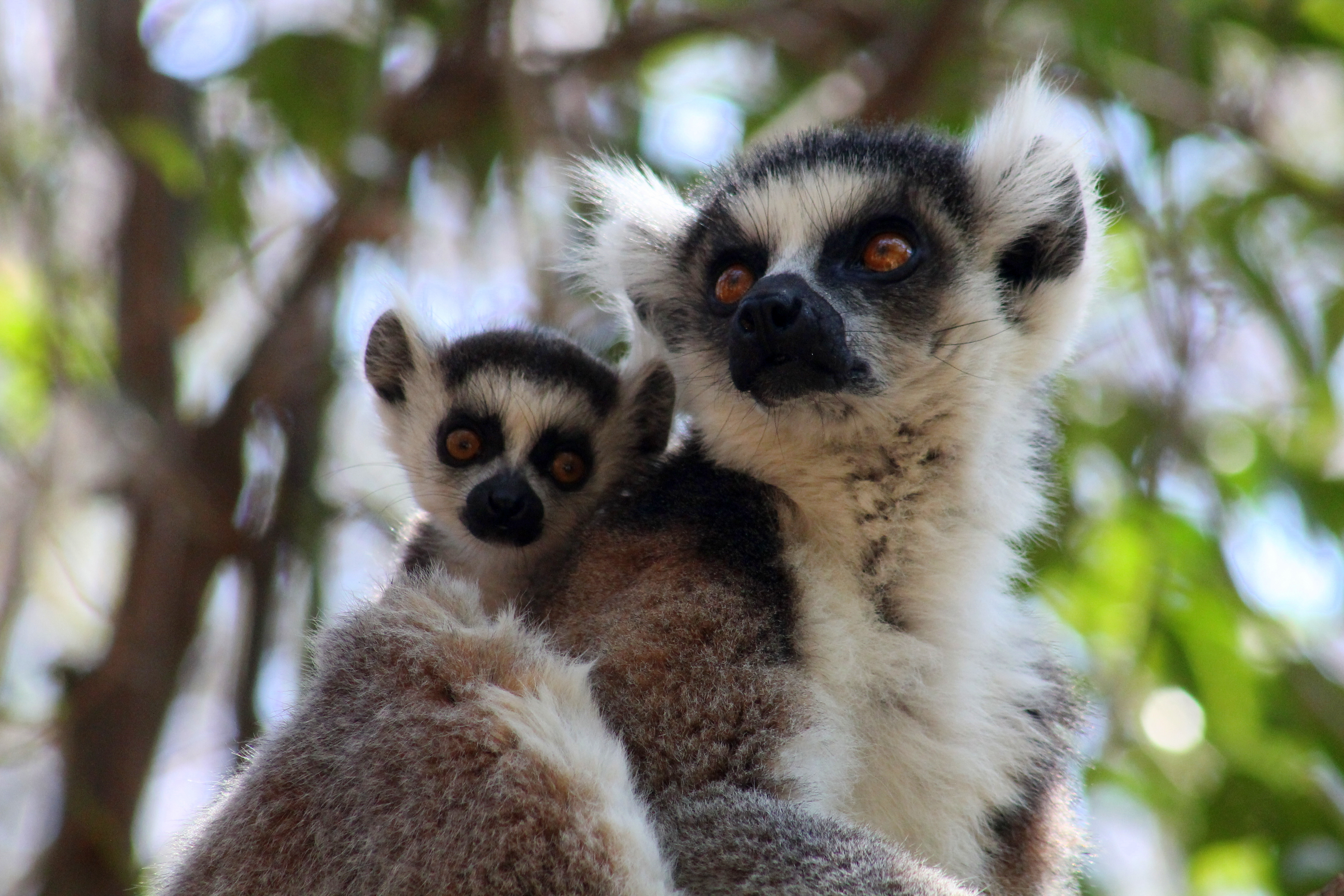 Ringstaartmaki in het Anja-reservaat